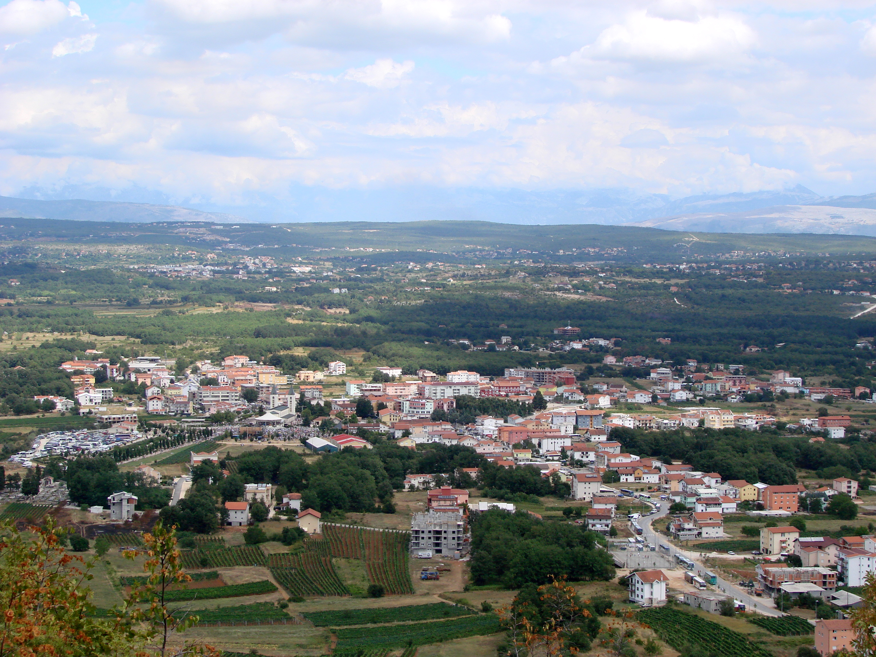 Miejscowość w Bośni i Hercegowinie położona w południowej części Hercegowiny na południowy zachód od Mostaru.